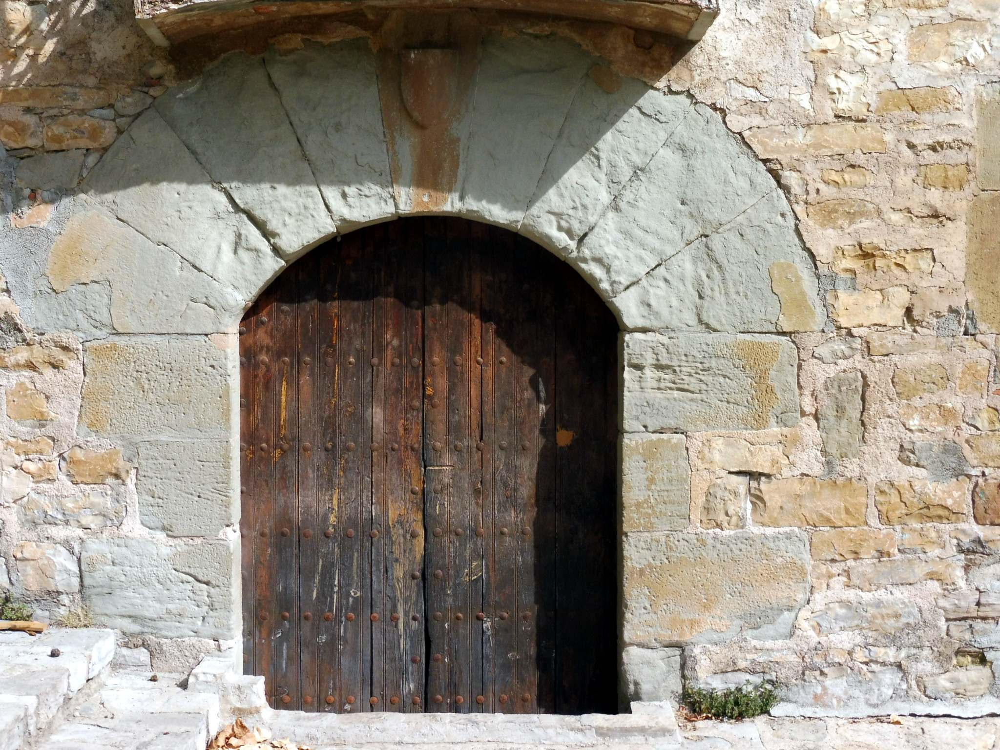 Molí de la Roda (Veciana): portada